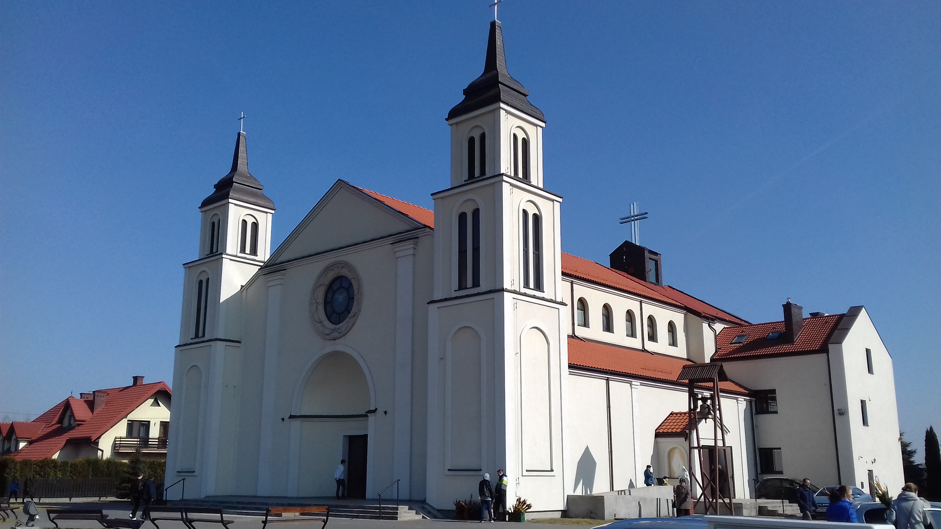 Dawidy Bankowe (gm. Raszyn, pow. Pruszków) - kościół św. Mateusza Ewangelisty